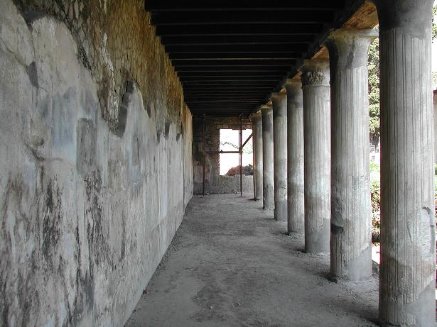 Casa d'Argo (part.) foto di Aldo Ardetti (14 agosto 2007)